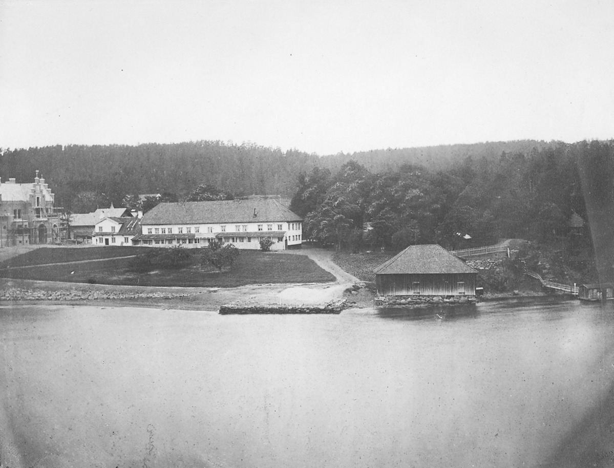 Vækerø gård 1880